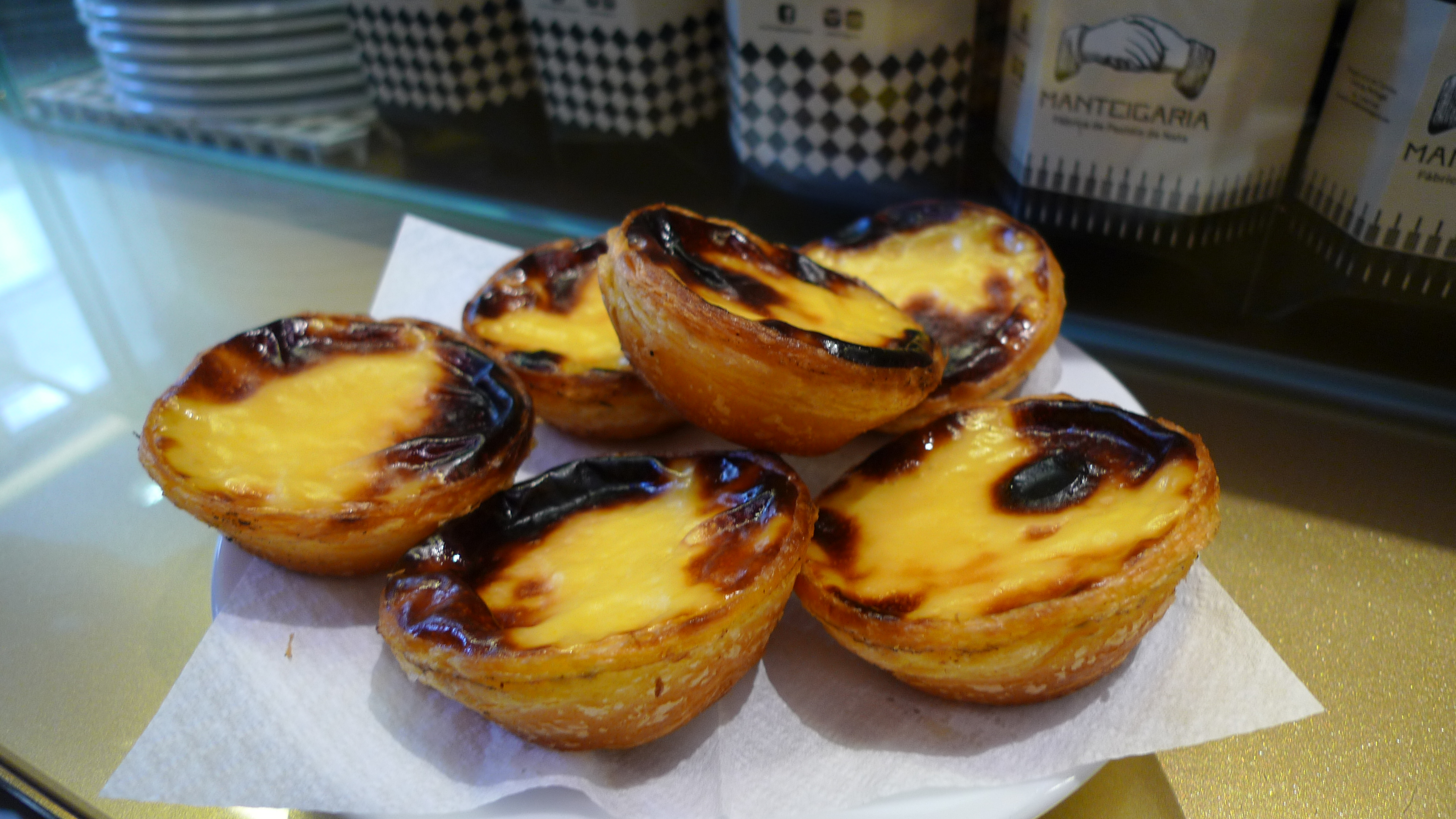 L1190050